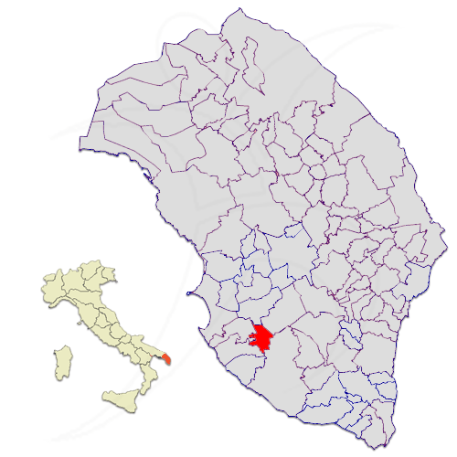 Il territorio del comune di Melissano nella provincia di Lecce